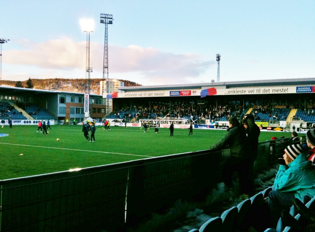 Første kamp i TL2010, mot KIL i vinterkulda på Gamle Gress.